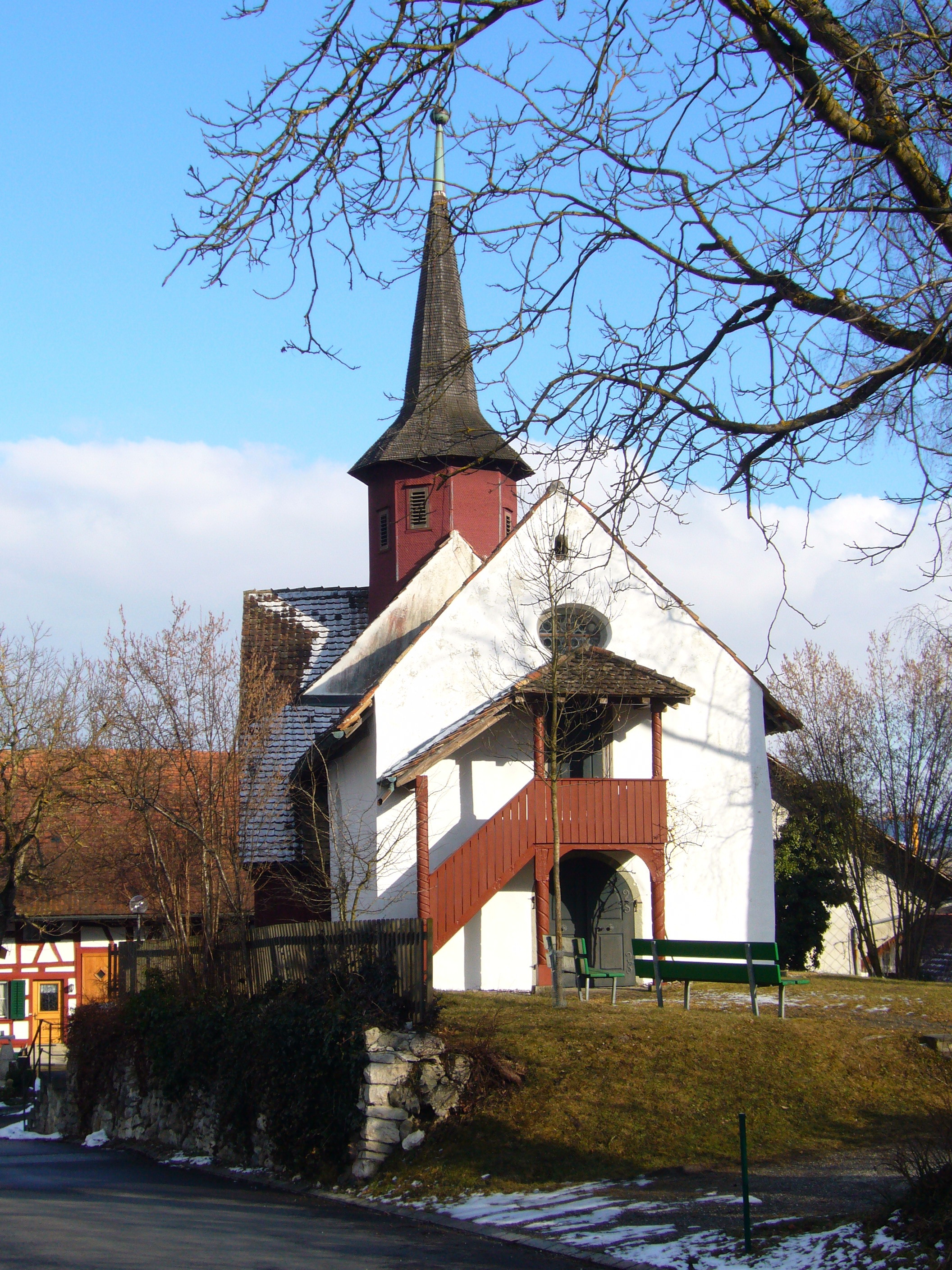 Kirche, Waltalingen, Kanton Zürich, Schweiz